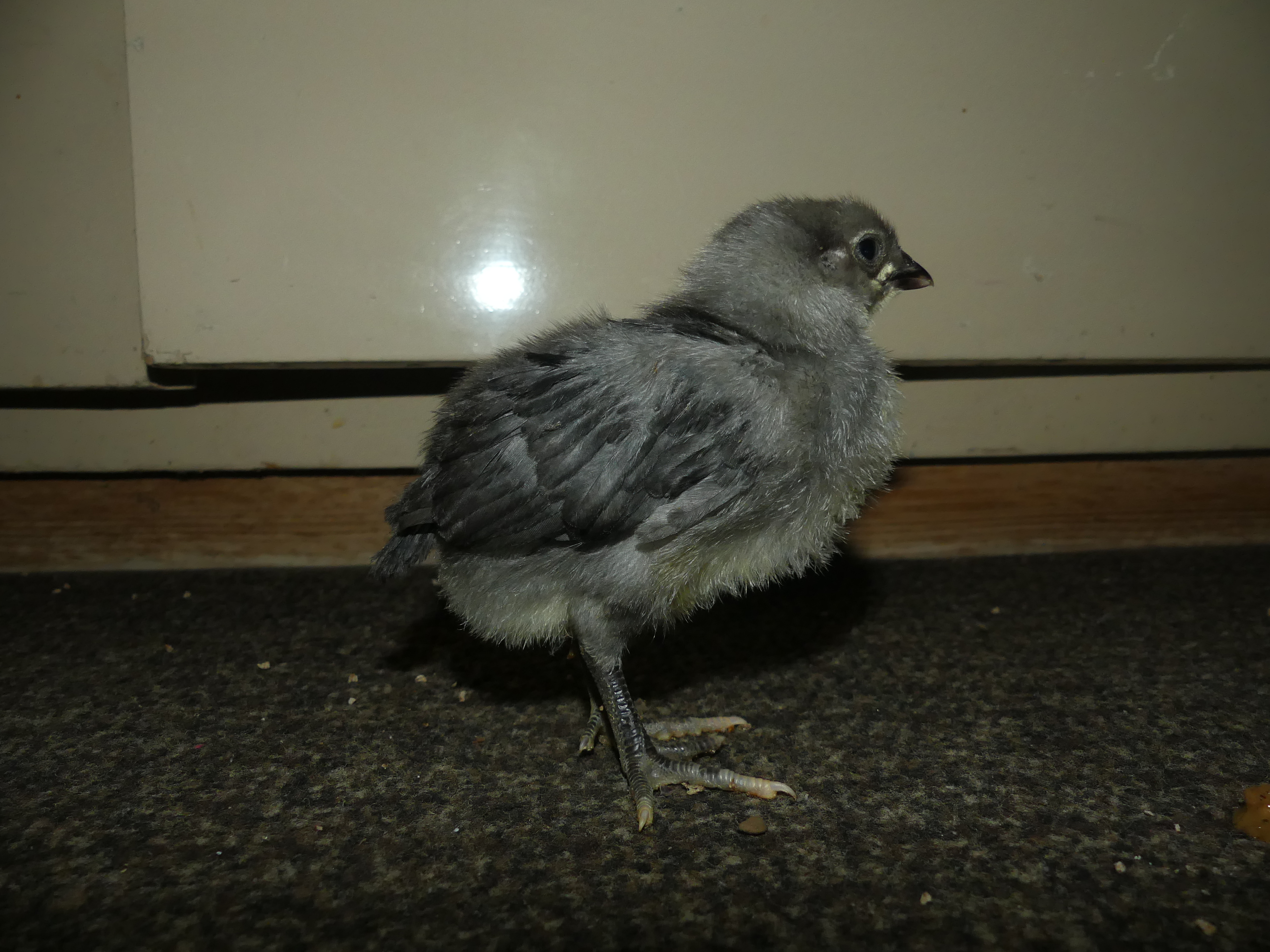 Poussin de poule d'Alsace bleu grande race